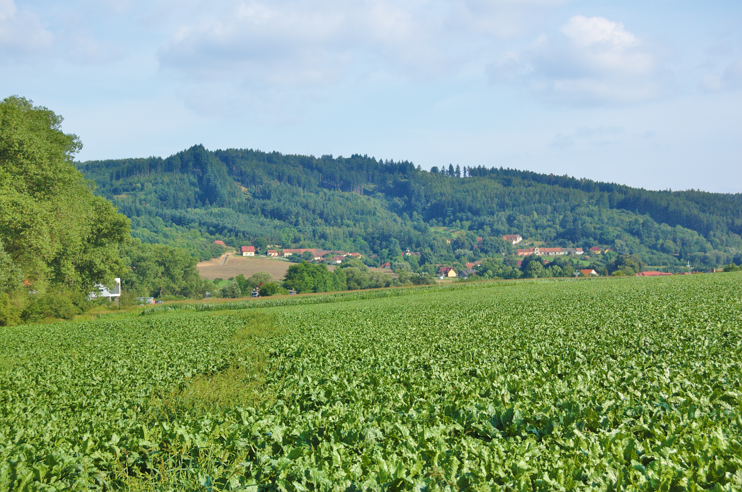 Pohled na obec od západu, Vážany, okres Blansko